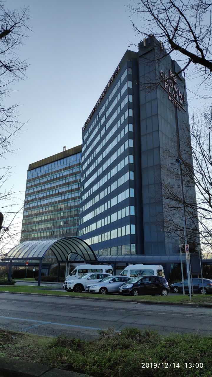 Crowne Plaza Hotel a San Donato Milanese